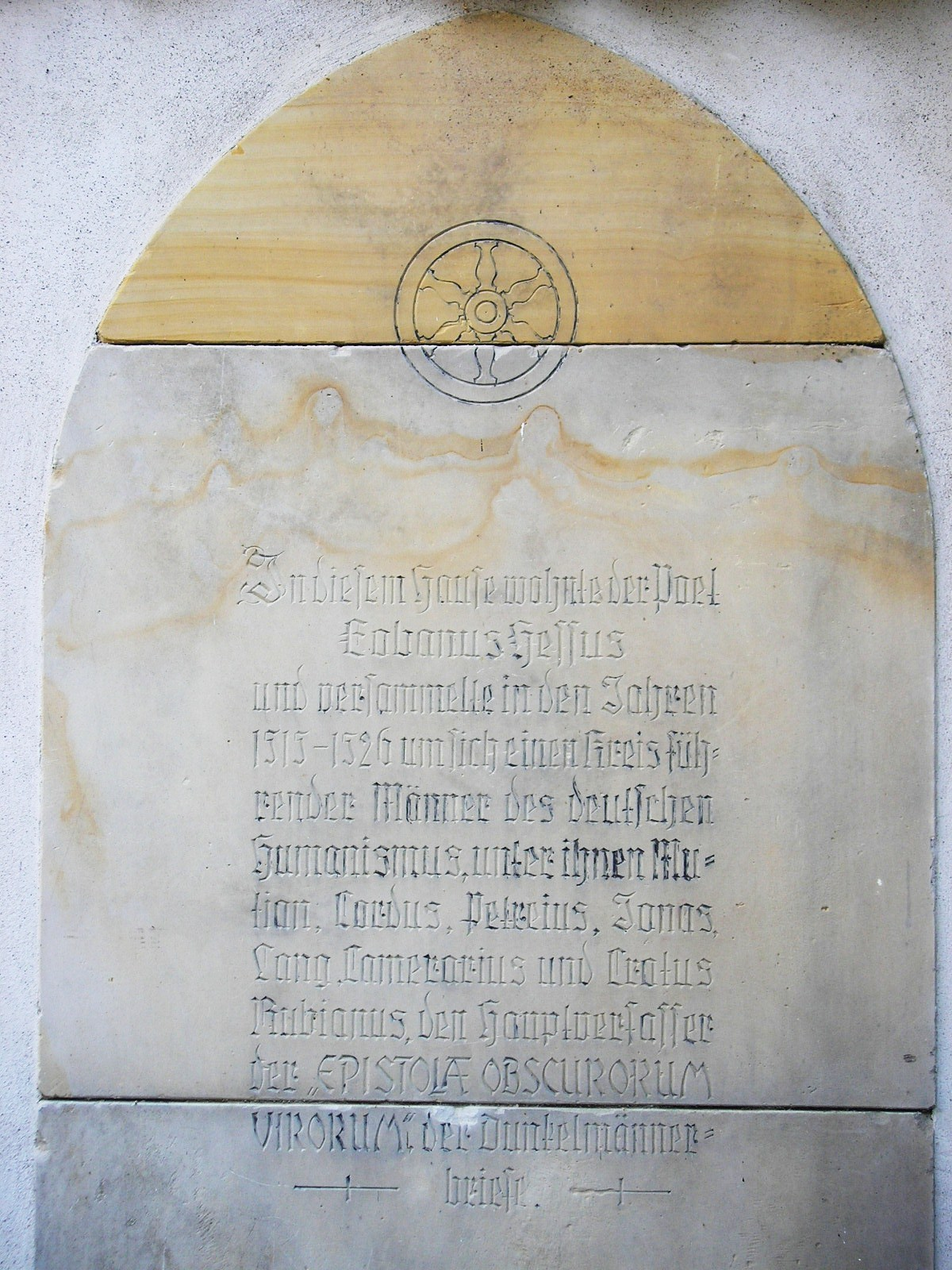 Gedenktafel für den Humanisten Helius Eobanus Hessus im Innenhof der Engelsburg in Erfurt.